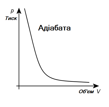 Адіабатична крива.